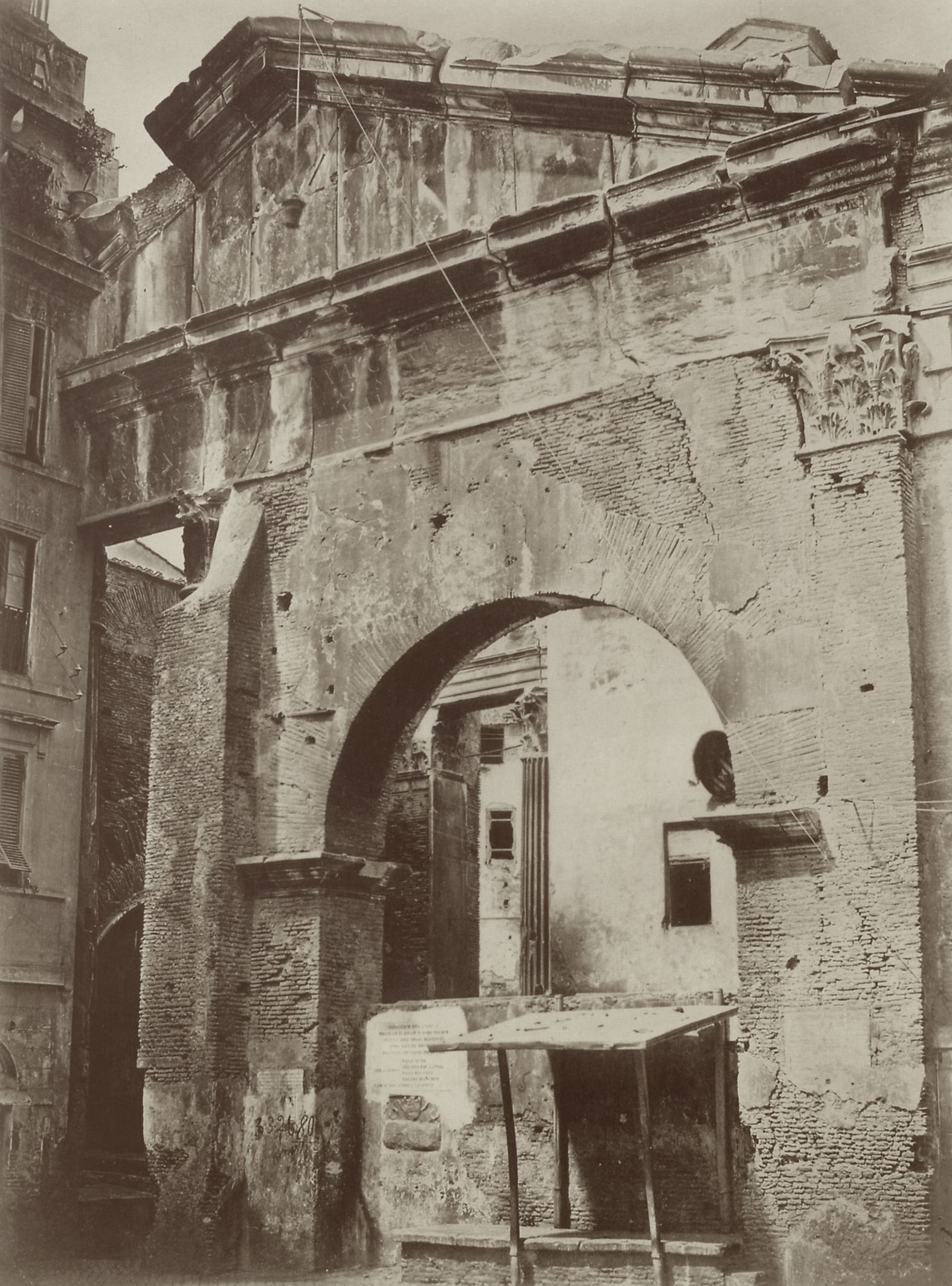 MacPherson, Robert: Das Ottavia Tor